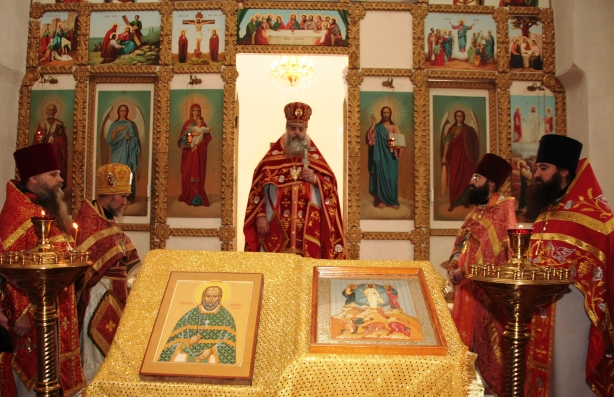 Празднование дня памяти священномученика Василия Константинова-Гришина. с.Кудеиха